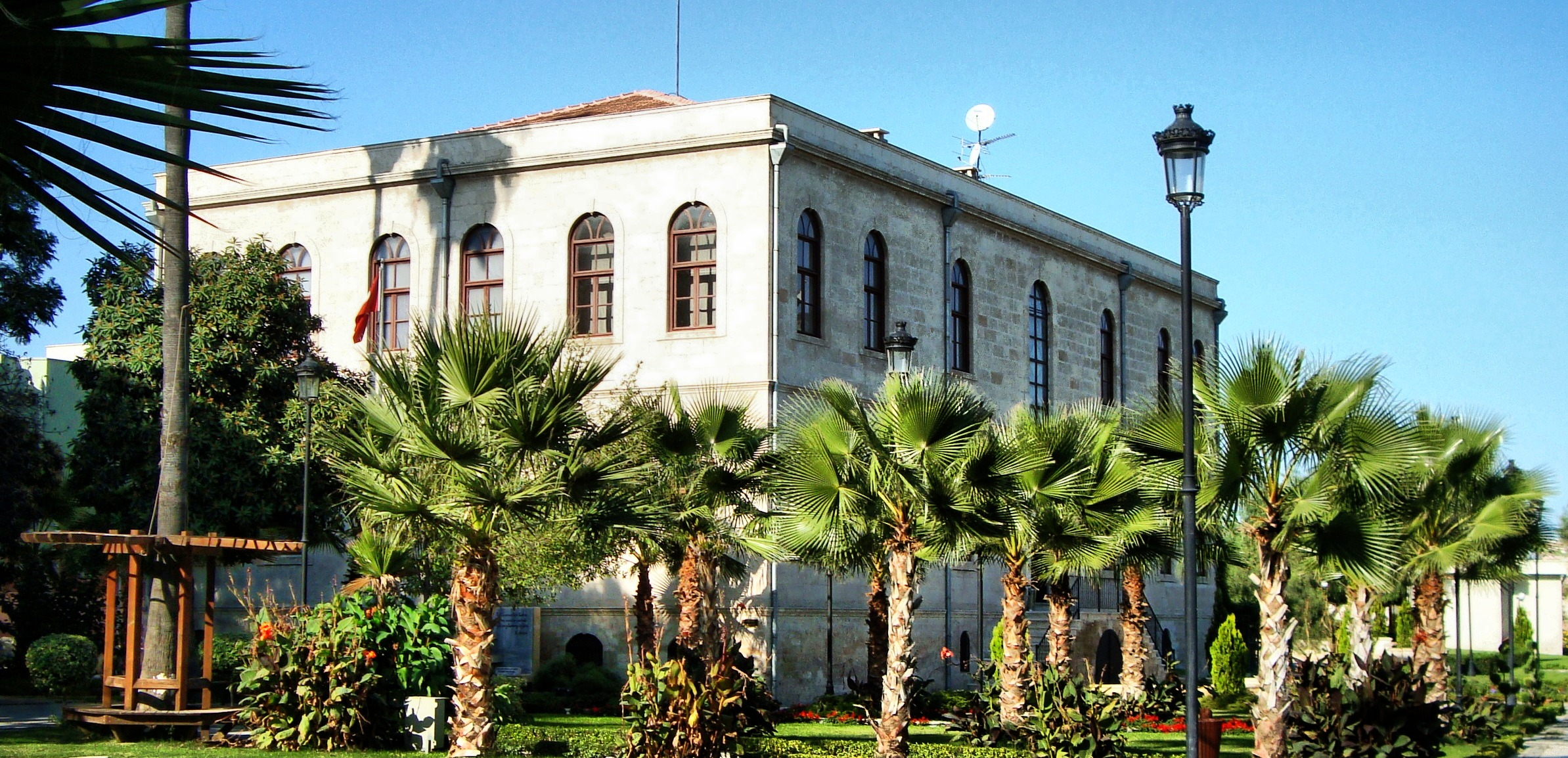 ADANA